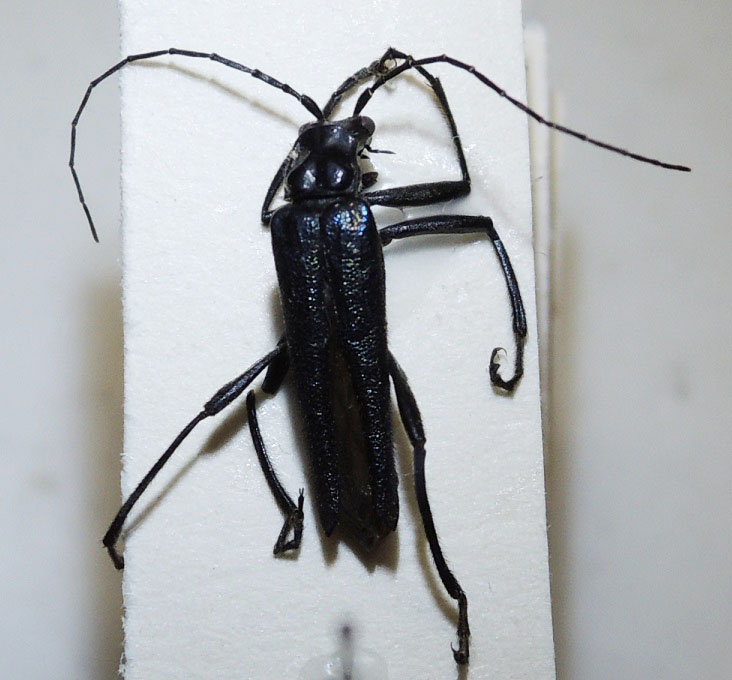 中文（台灣）: 新里琉璃異菊虎雄成蟲